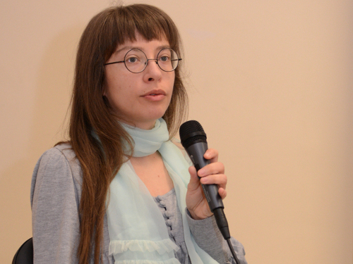 Петя Кокудева - детски автор